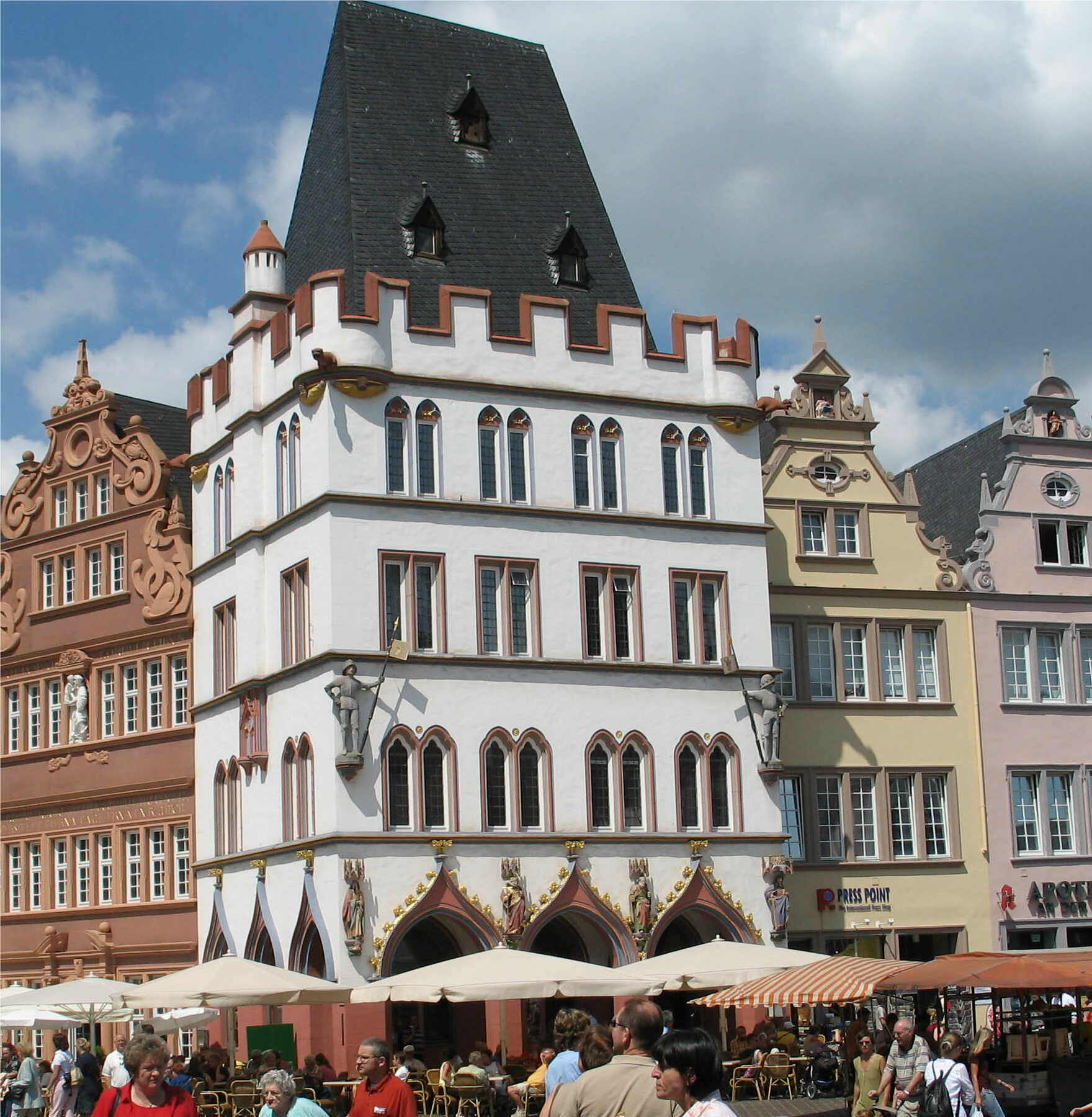 Um Maart zu Tréier Source:Eege Foto Lizenz: GFDL Kategorie:Tréier